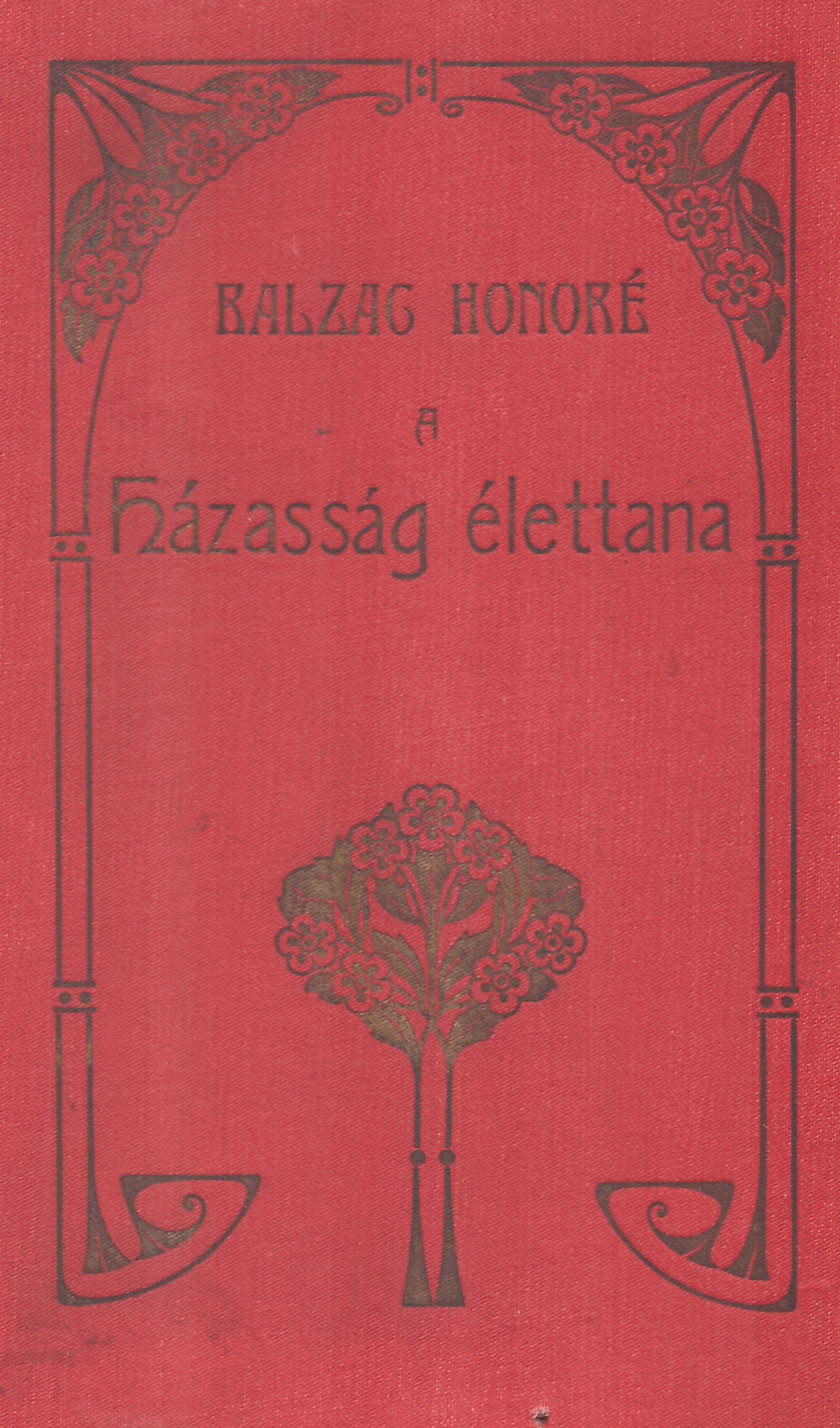 Honoré de Balzac (1796-1850): A házasság élettana (1907-es kiadás)